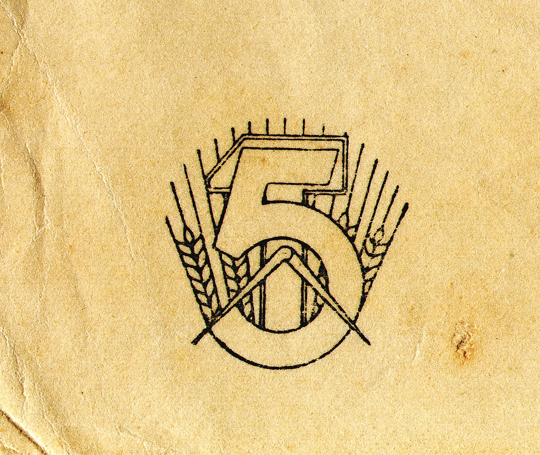 Signet für den ersten Fünfjahresplan der DDR, der die Jahre 1951 bis 1955 umfasste, verwendet auf einem Briefbogen des Außenministeriums der DDR im Jahr 1951.